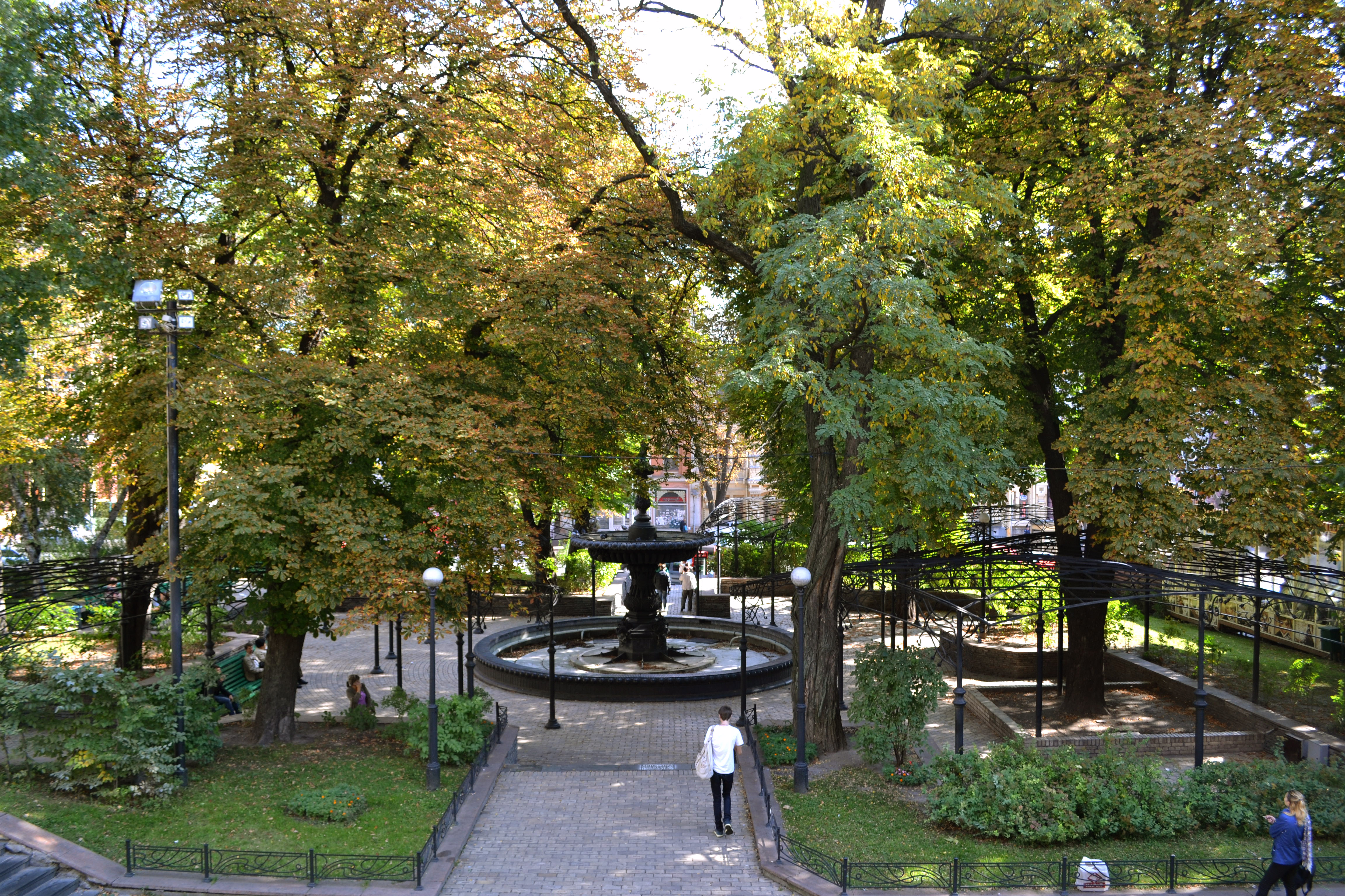 Зелень Золотоворотского сквера